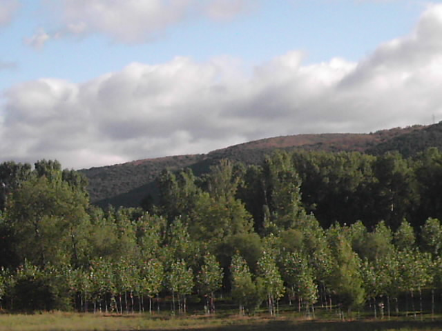 Chopera del río Bernesga.